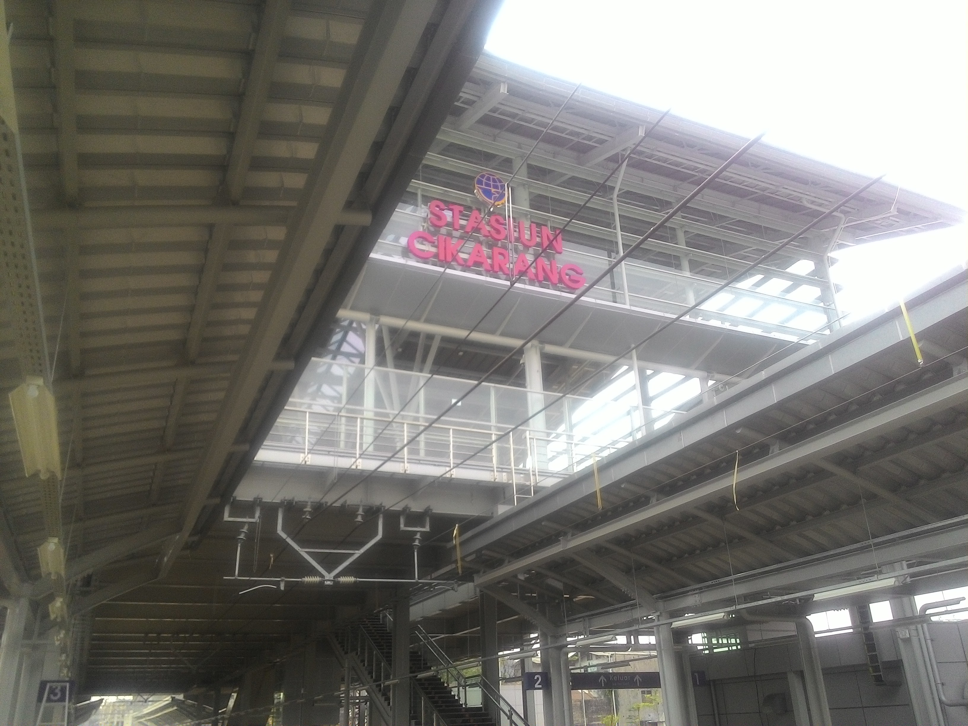 Stasiun Cikarang Terbaru 2017